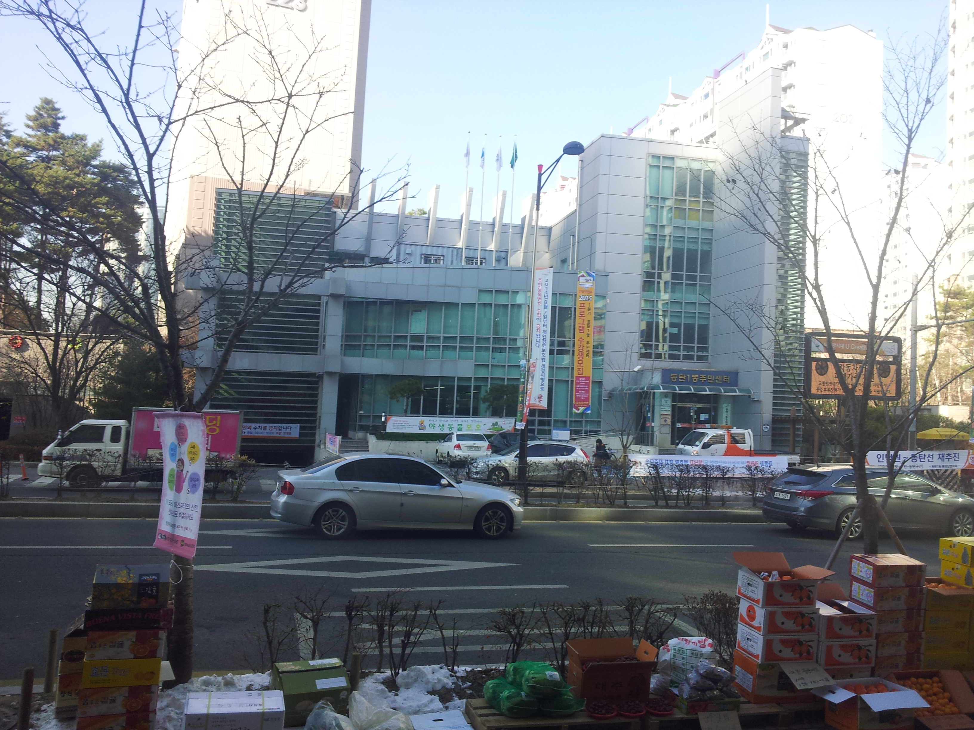 동탄1동사무소